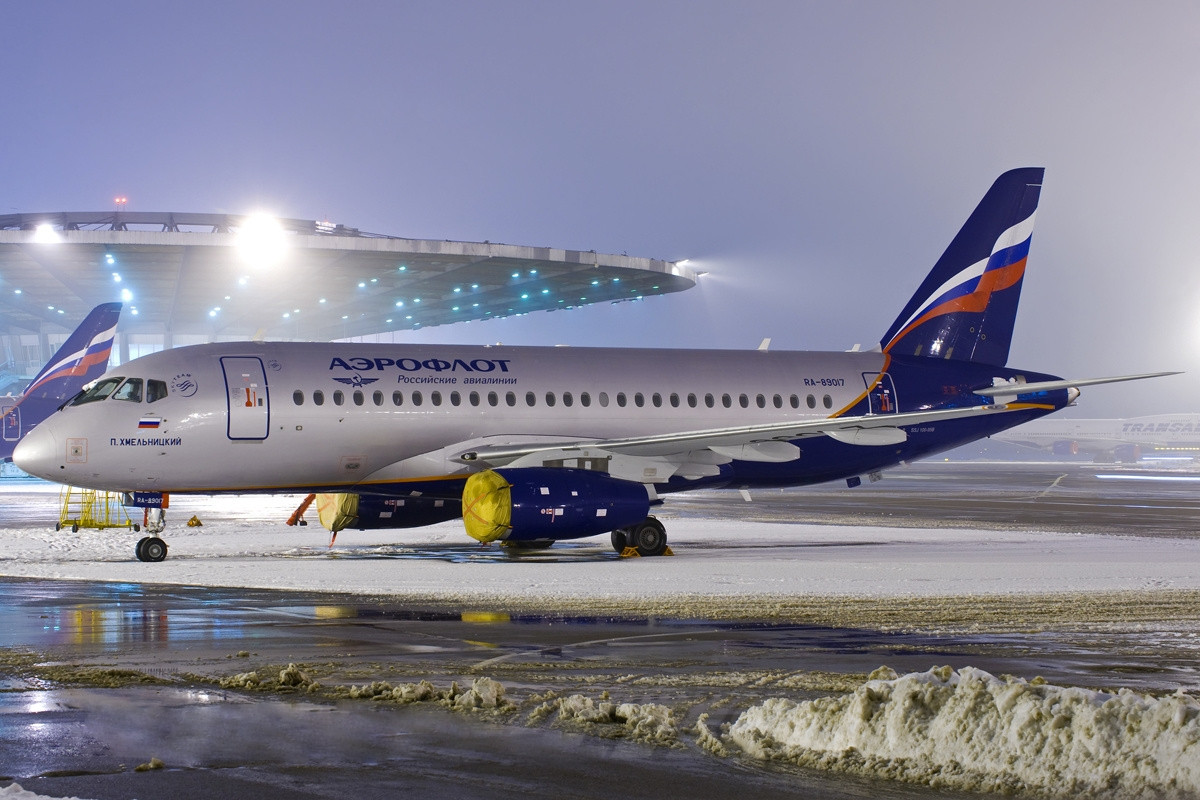 Sukhoi Superjet 100-95 (RA-89017)